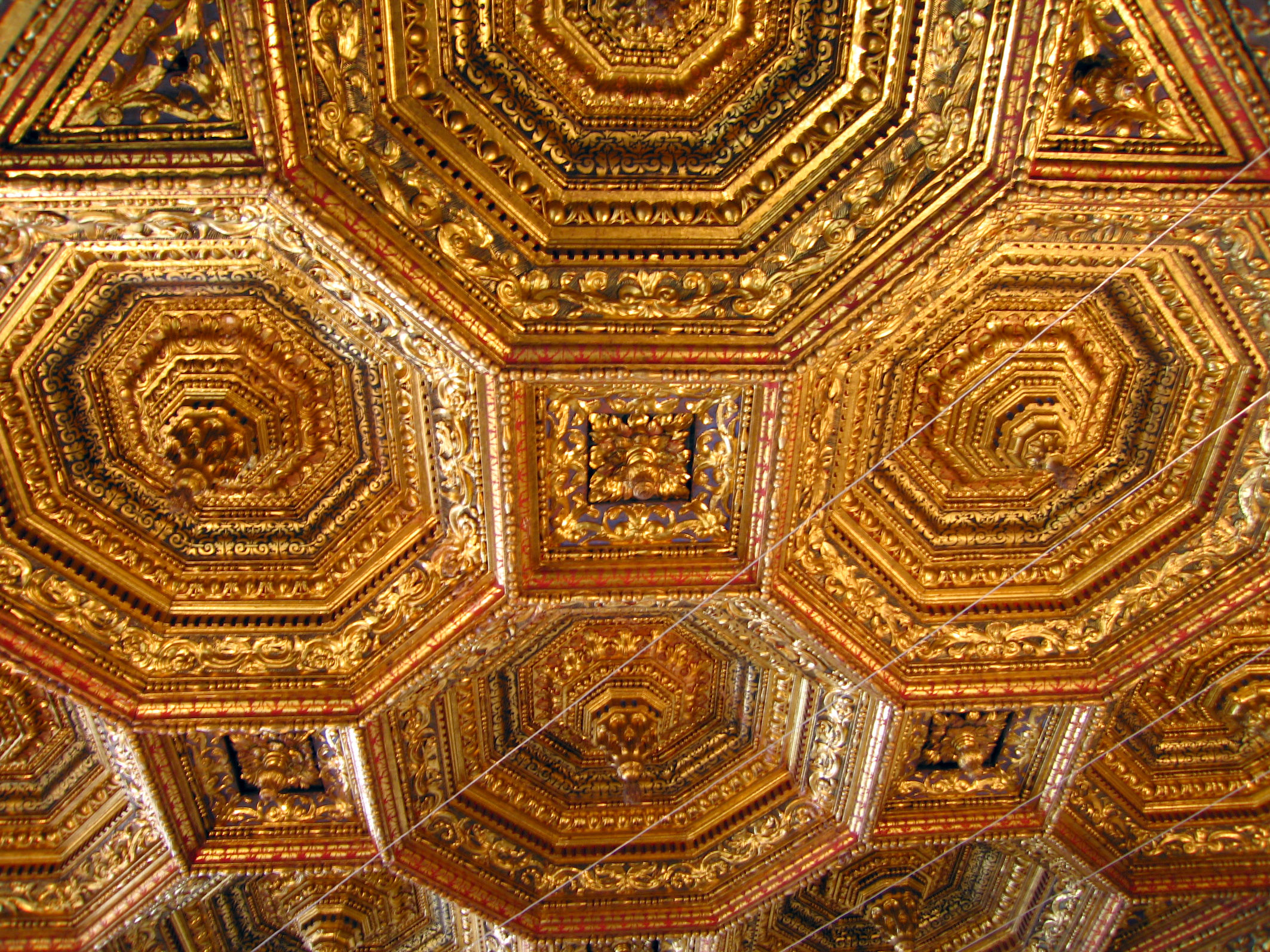 Sala Daurada de la Generalitat Valenciana